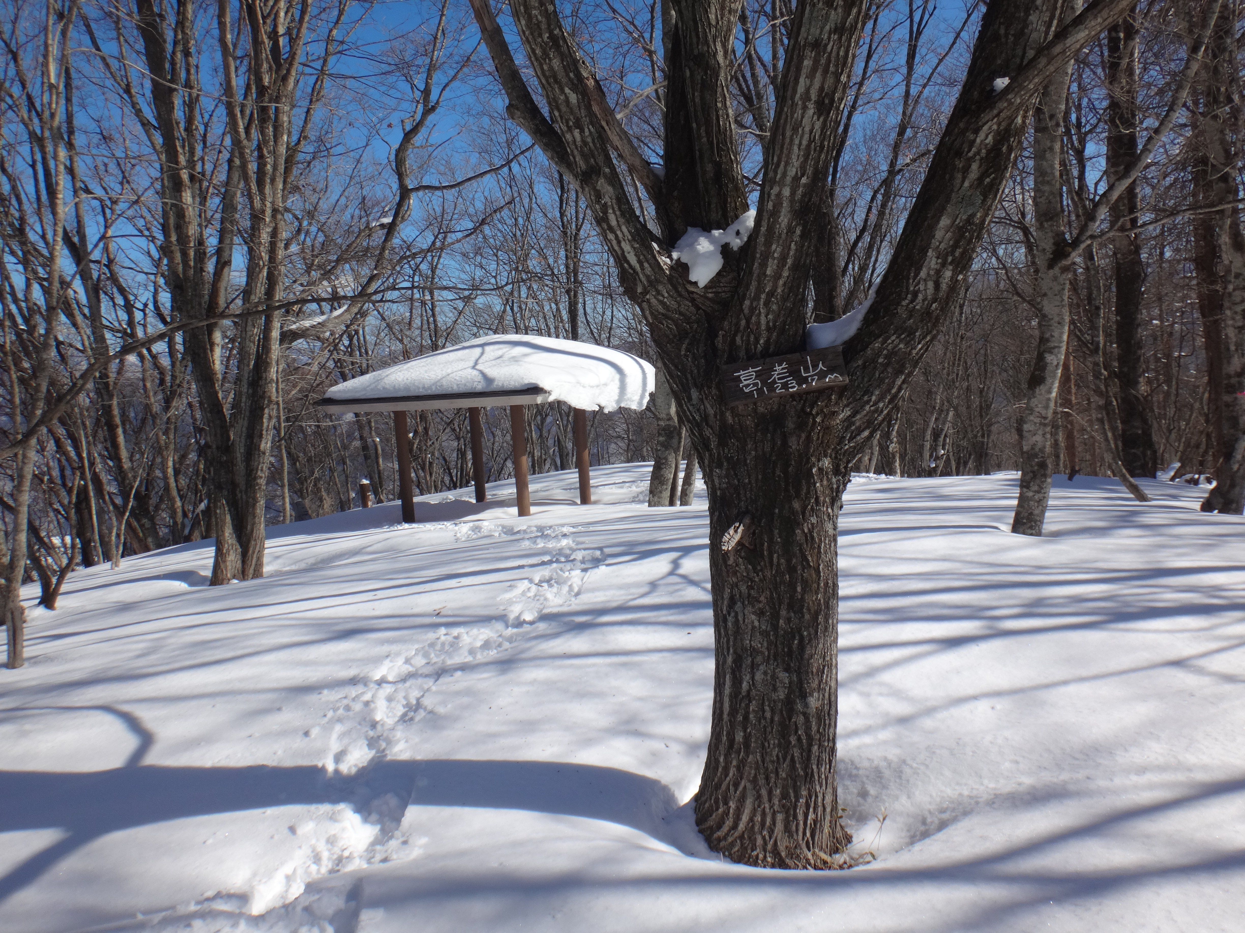 葛老山山頂